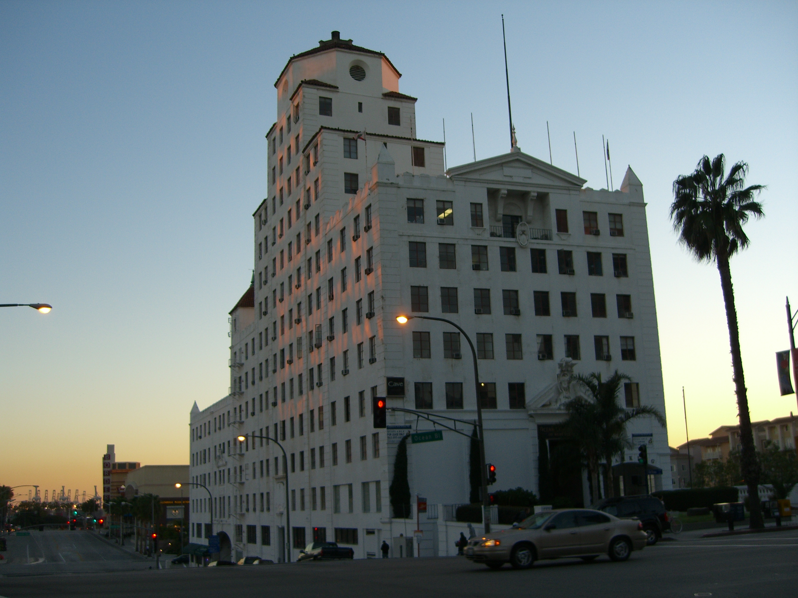 CIMG4433